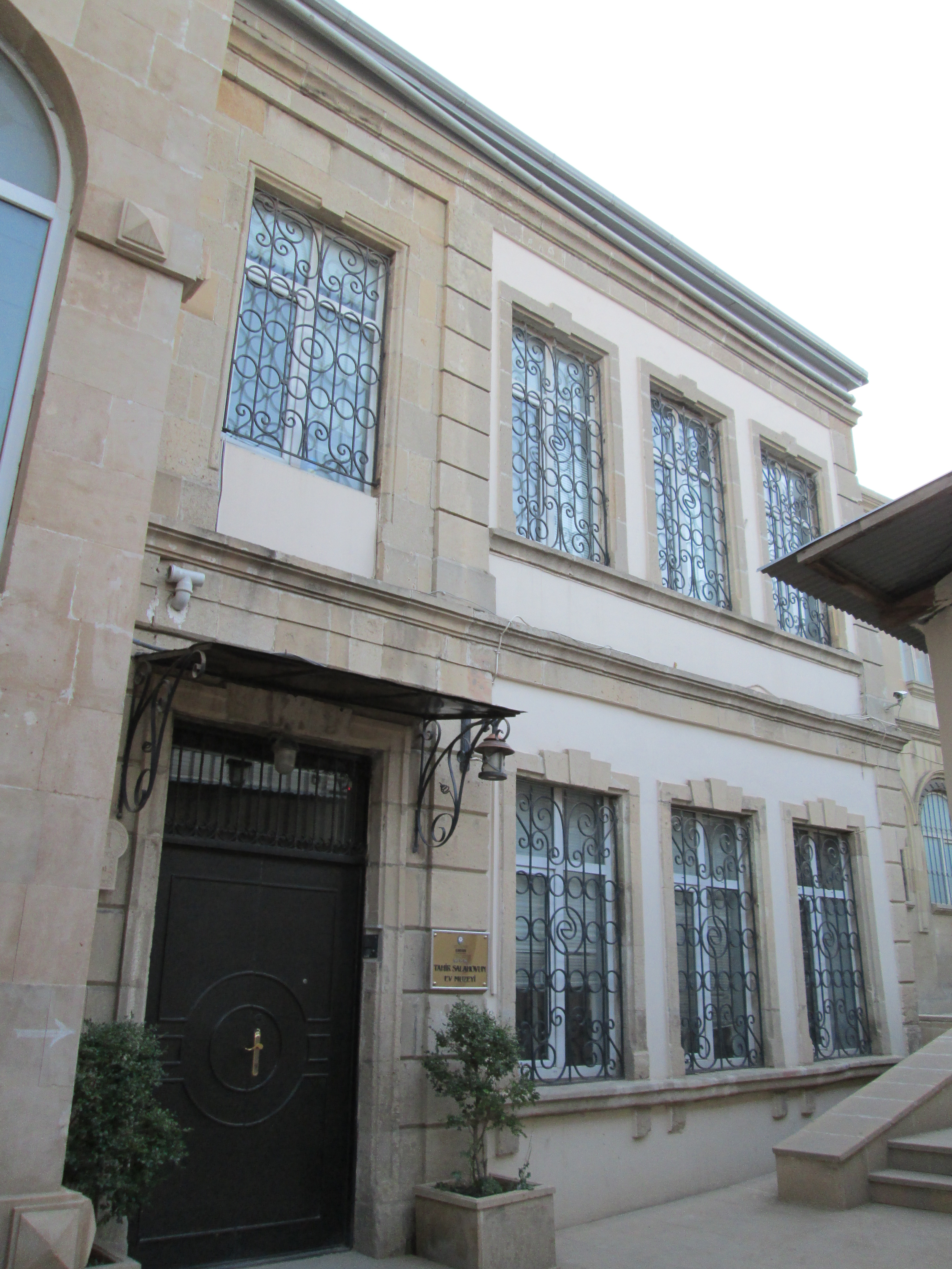 3-cü Əfəndiyev 1